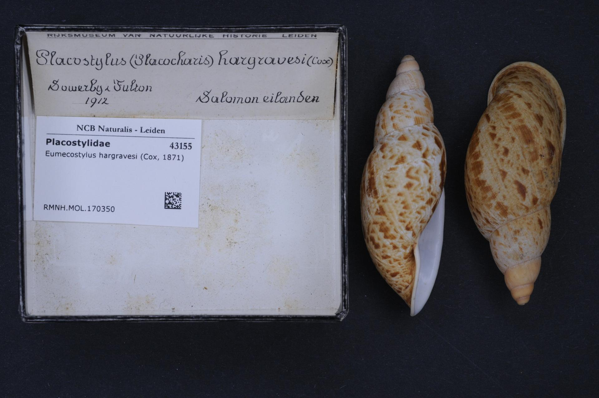 Eumecostylus hargravesi (Cox, 1871)